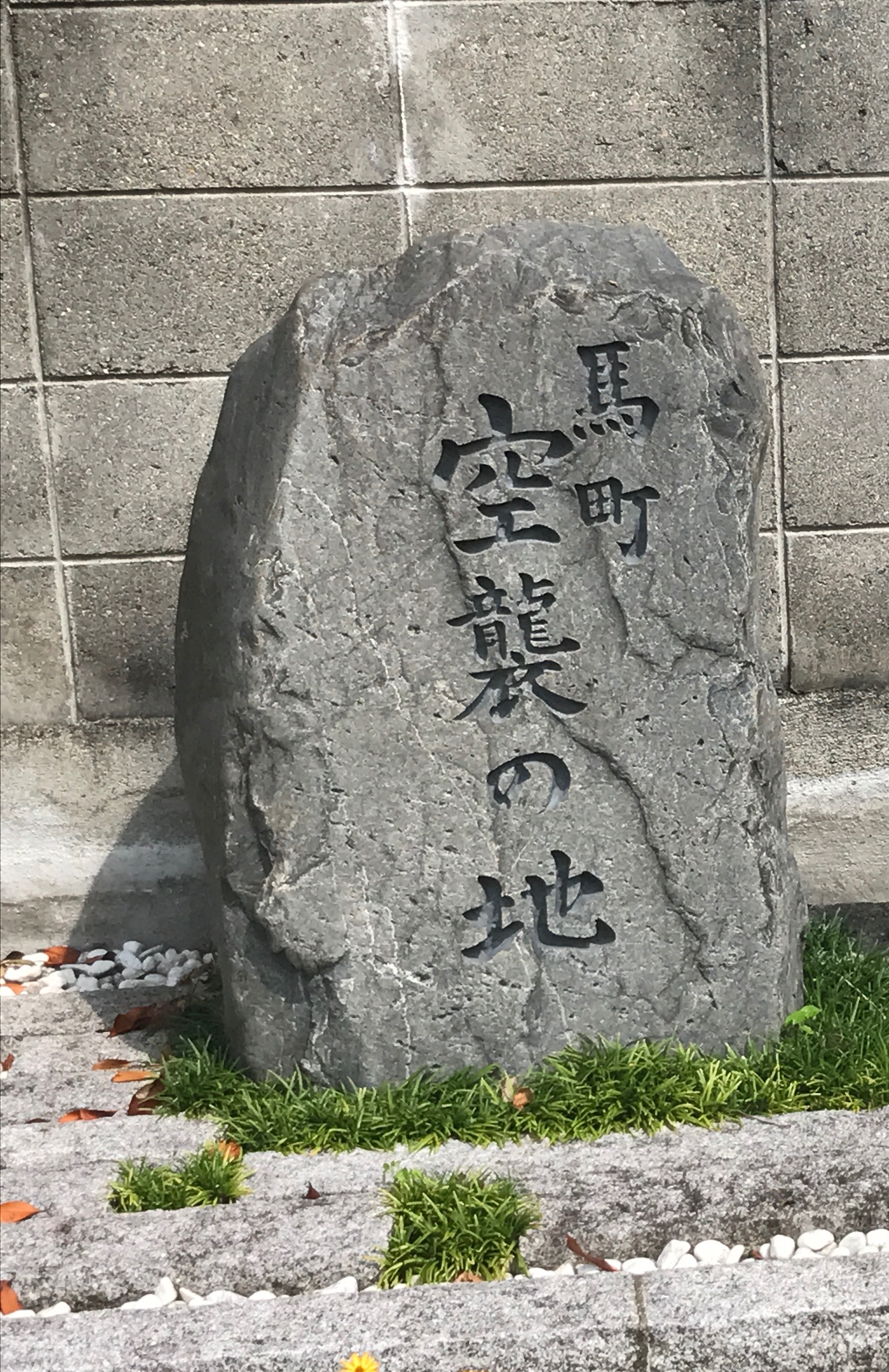 京都市東山区馬町 渋谷街道起点付近にある空襲の地石碑